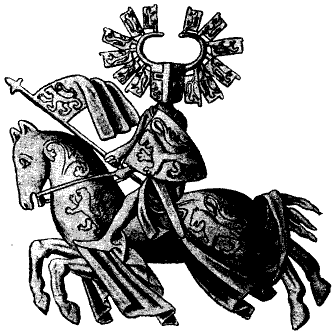 Hertug Erik Magnussons segl